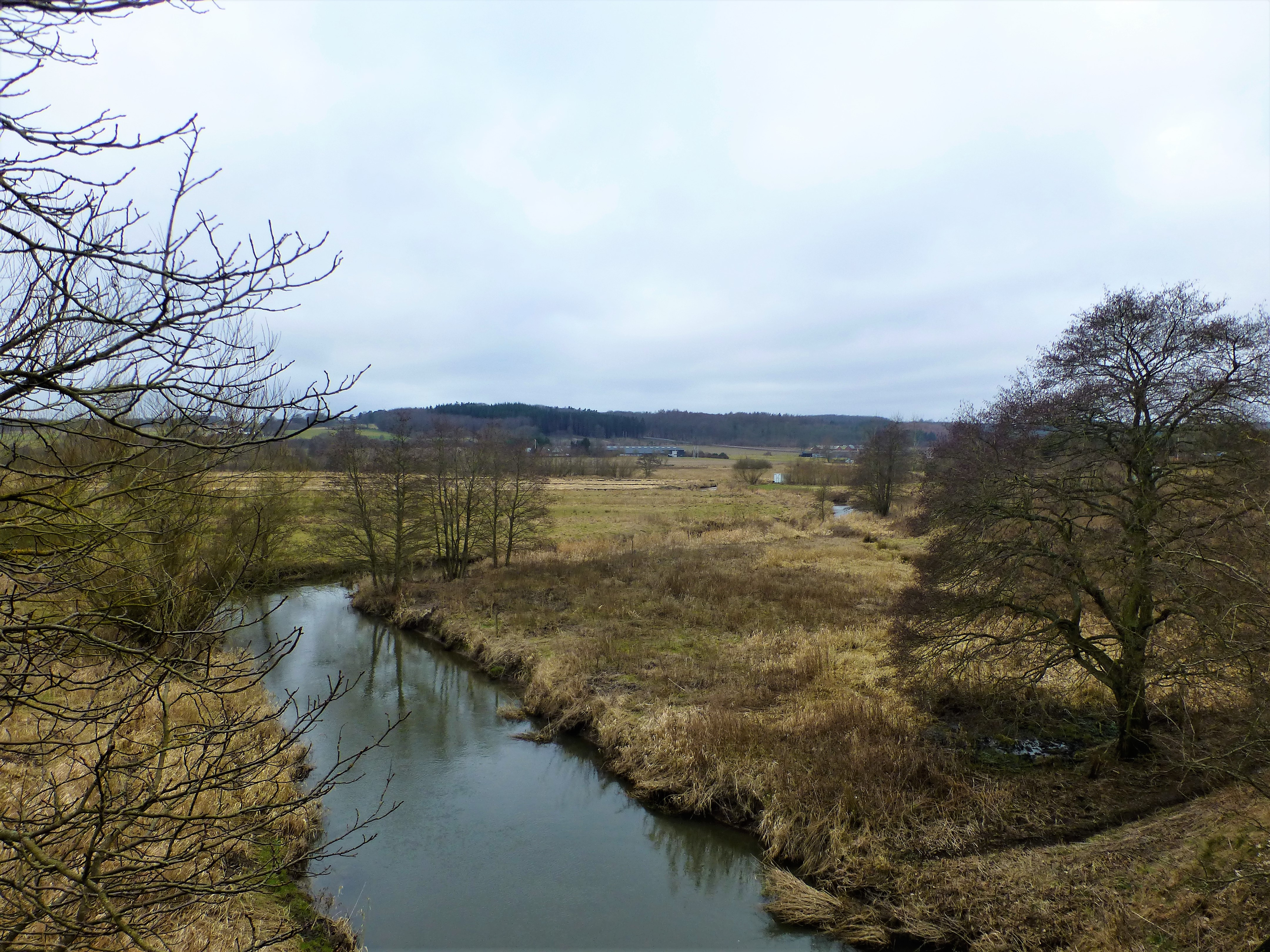 Lilleå ved Laurbjerg , set mod øst fra den nedlagte jernbanebro